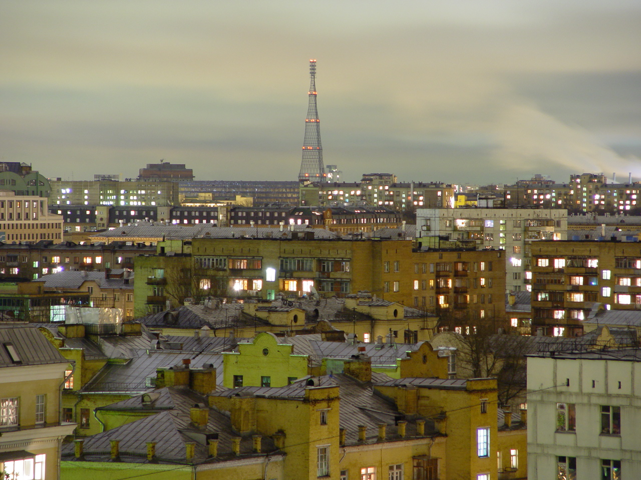 Башня на Шаболовке, вид из Хамовников. На переднем плане - дома 1926 года на улице Усачева, 19 корпуса 1, 2 и 3. Многоэтажные дома на месте "Каучука" и троллейбусного парка, заслоняюшие ныне (2018) этот вид, еще не построены.